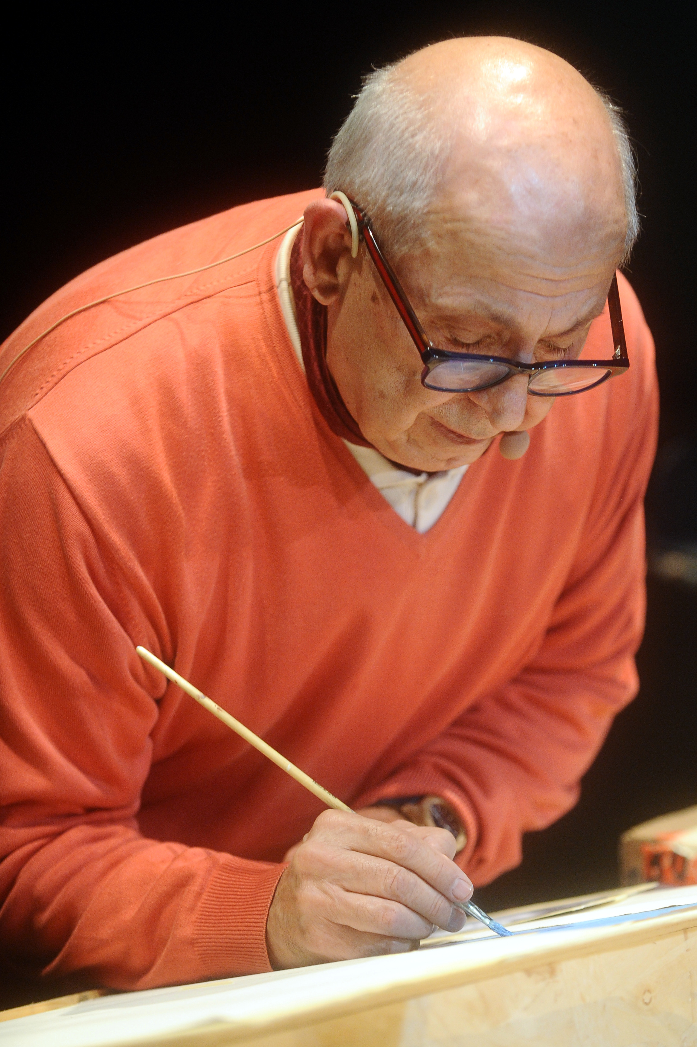 Emanuele Taglietti a Lucca Comics & Games. Auditorium San Girolamo.